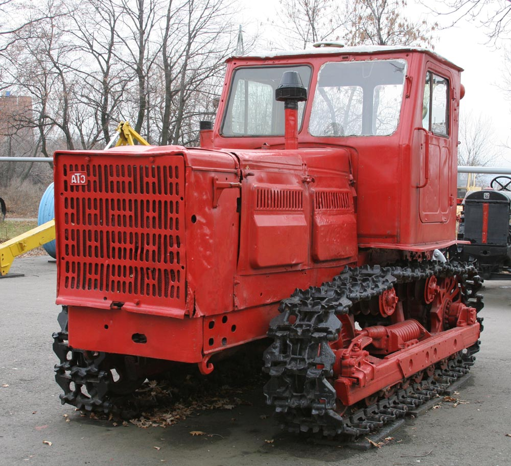 Трактор Т-4А в Саратове на Соколовой горе